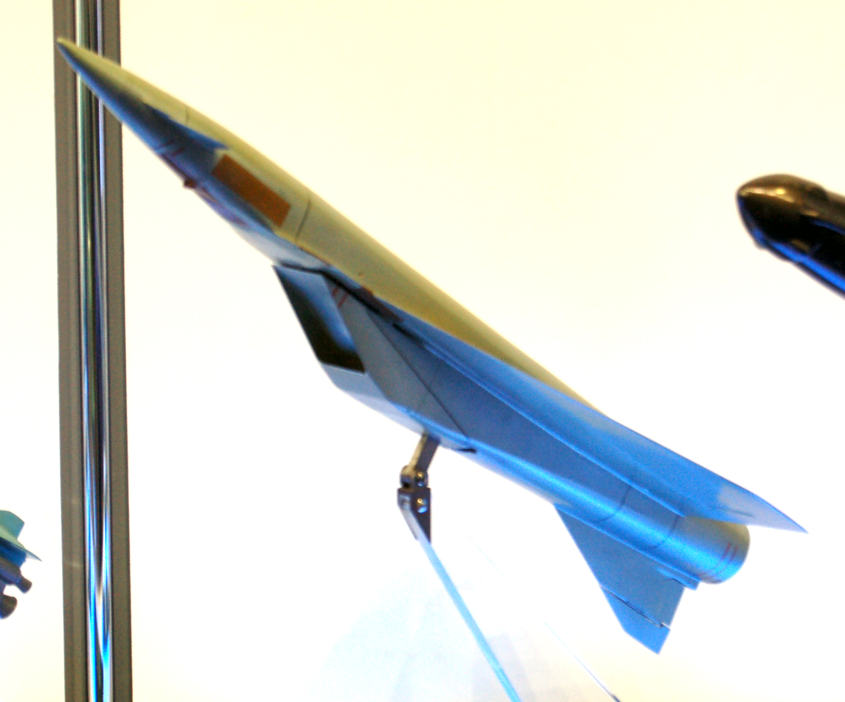 Макет ракеты П-750 Метеорит на МАКС-2009